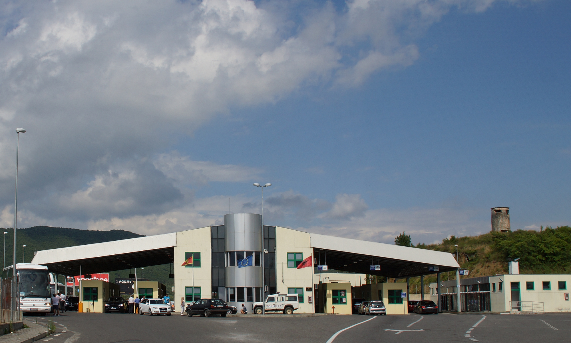 Montenegrinisch-albanische Grenze: Grenzübergang bei Sukobin (Montenegro), Foto Grenzabfertigungsgebäude von Montenegro gesehen auf rechter Seite Richtung Muriqan Albanien. Foto Wolfgang Pehlemann DSC05740